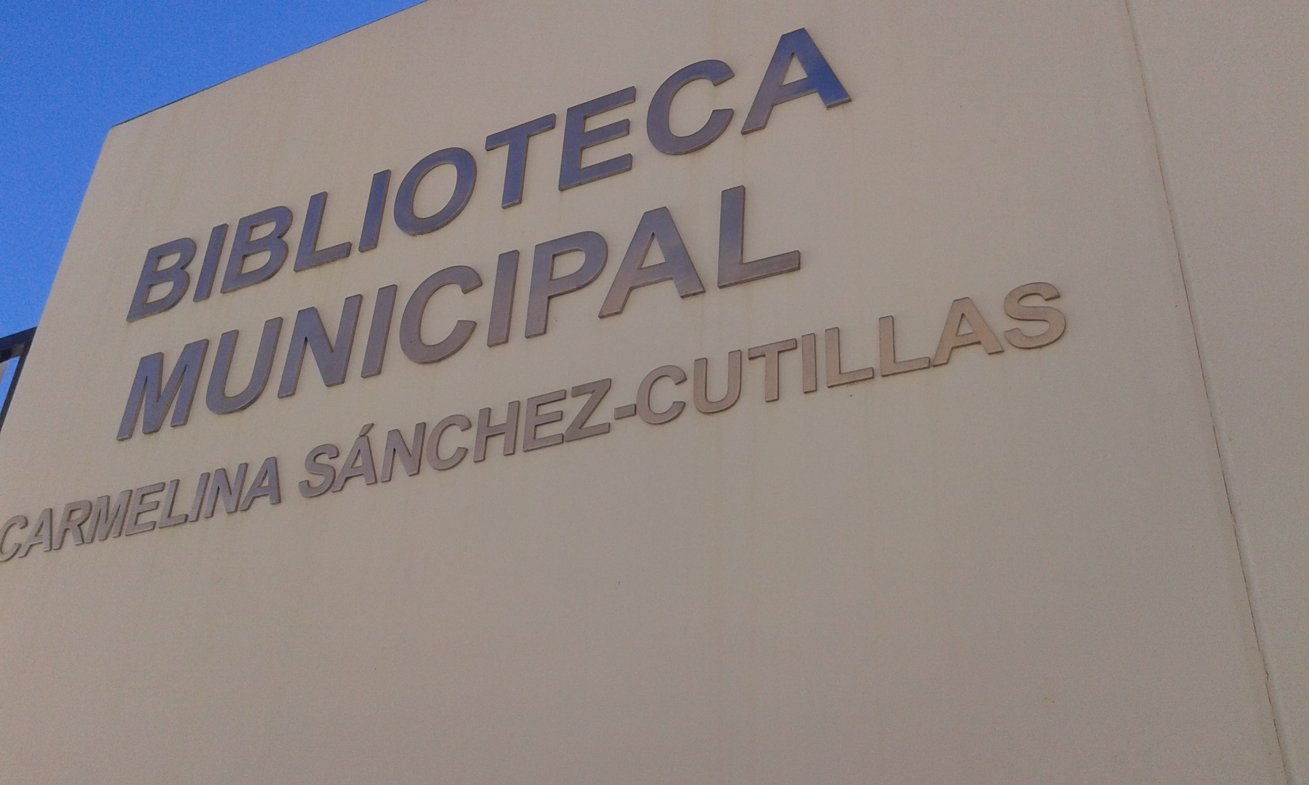 Viquimarató dia de la dona a la biblioteca Carmelina Sánchez-Cutillas a Benimaclet